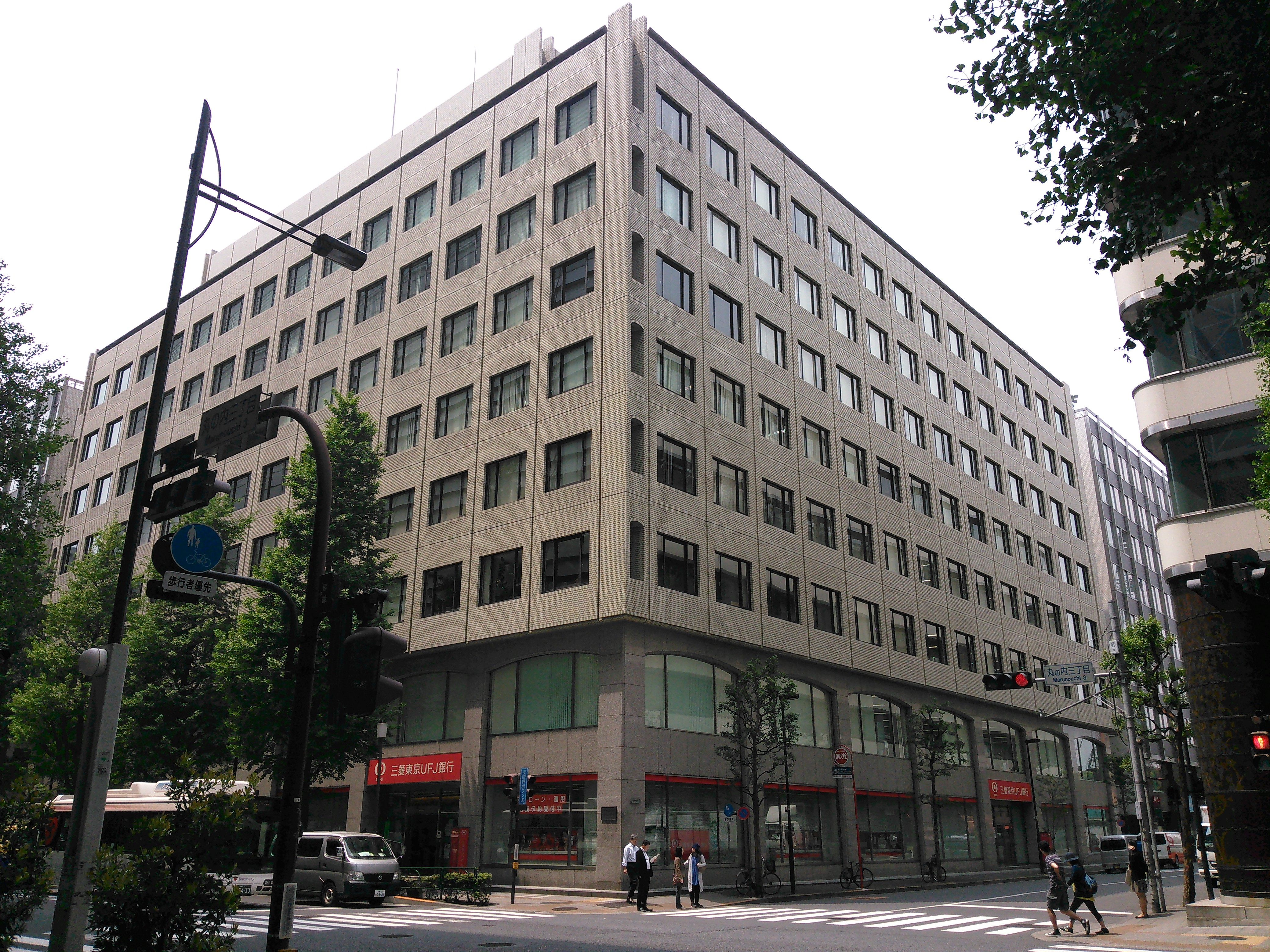 東京・丸の内、新日石ビルヂング